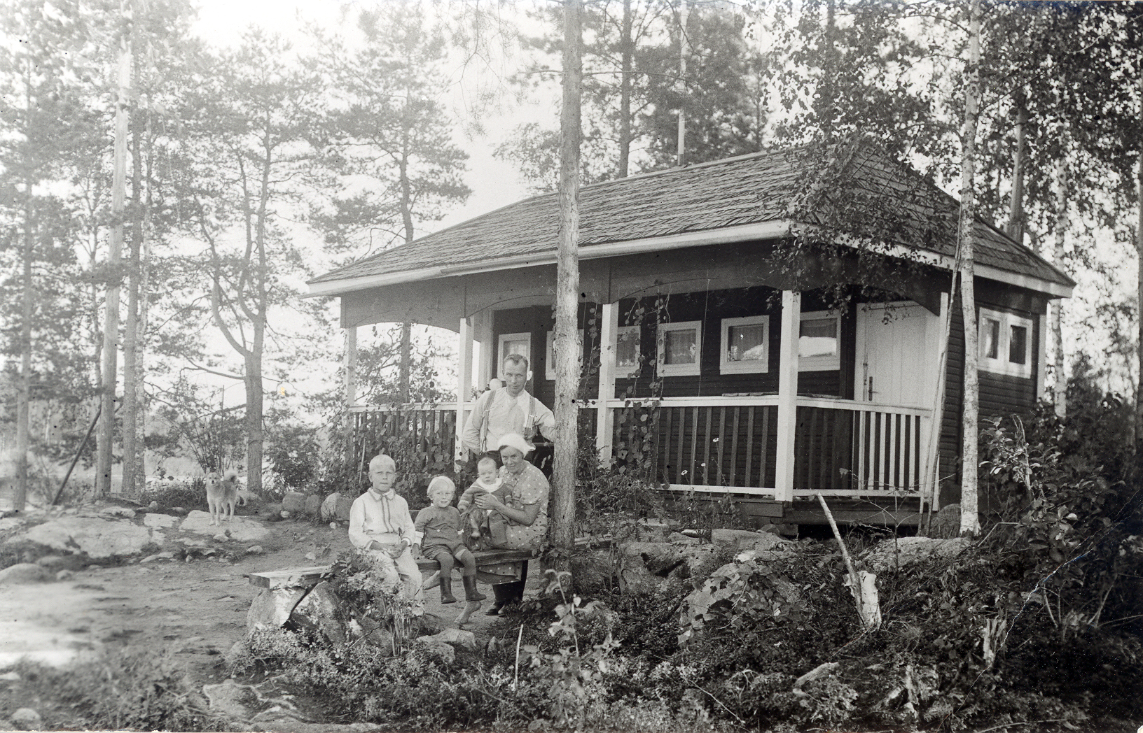 Sinisalon perhe (Antti, Matilda, Kosti, Reijo ja Seppo) junanvaunusta tehdyllä "Majalla" vuonna 1935.